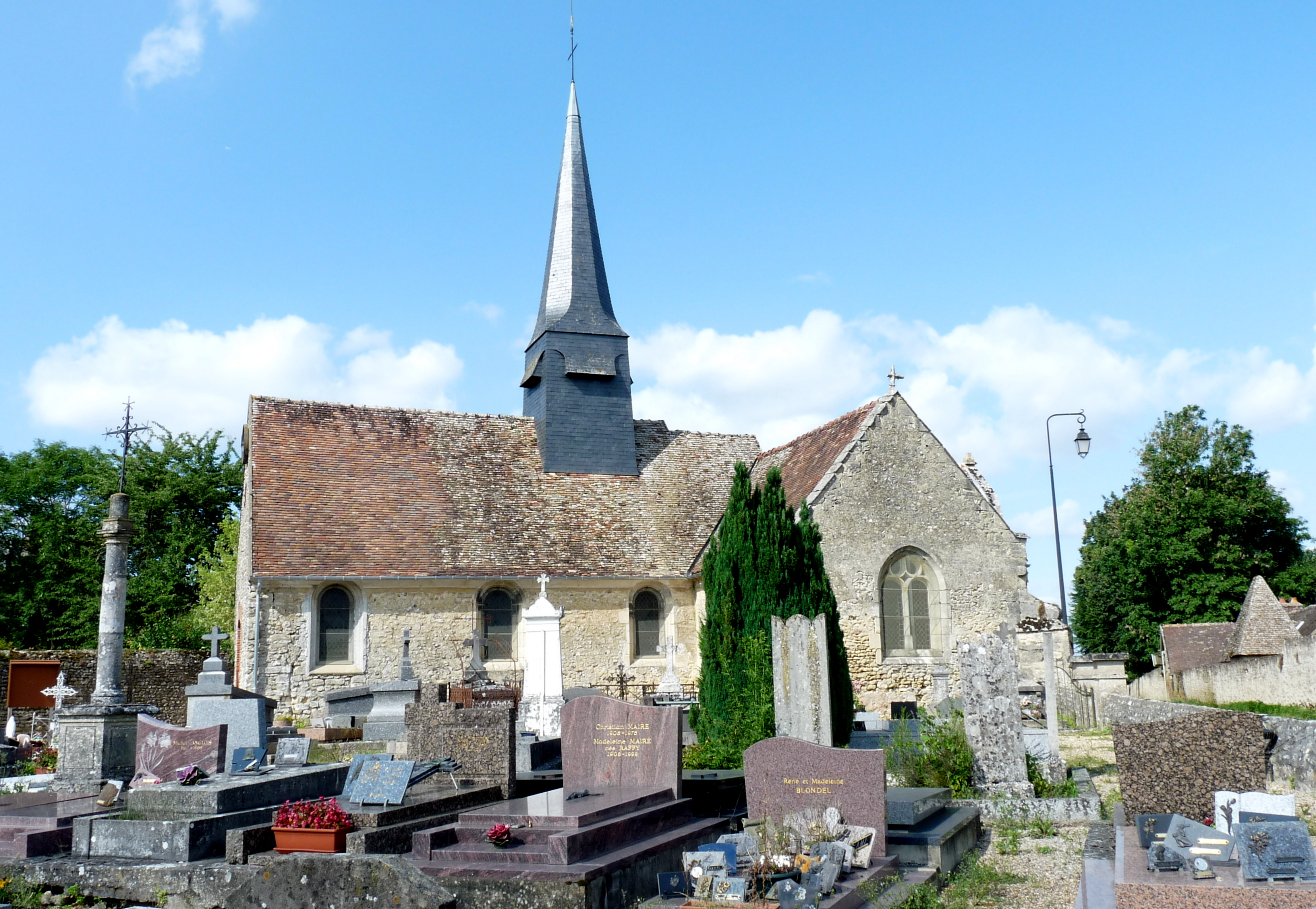 Église Notre-Dame de Guerny.